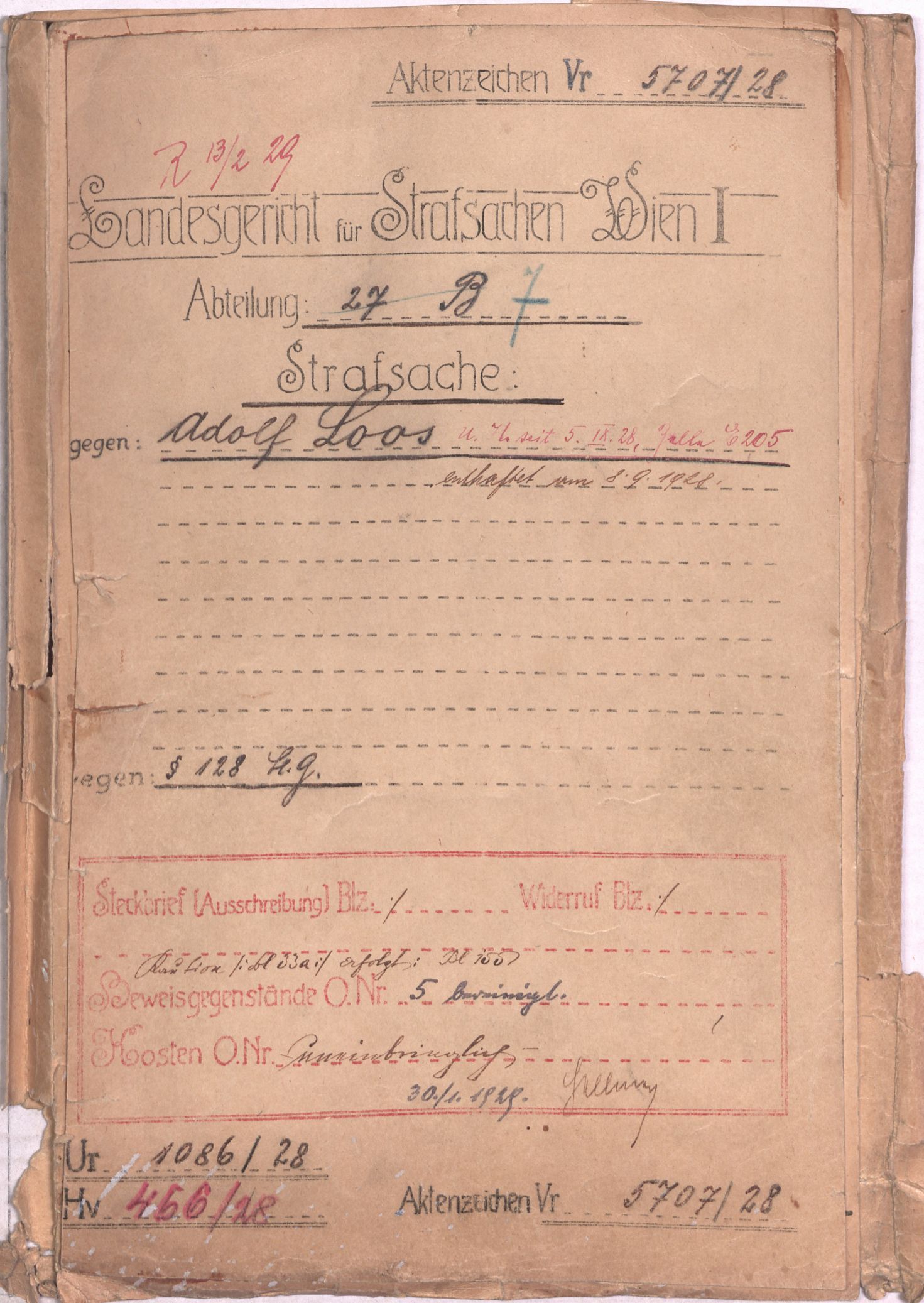 CommonsHelper was not able to transfer it, so I uploaded it manually